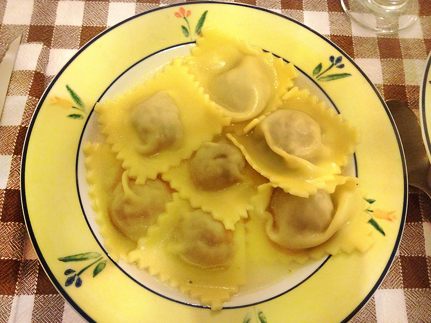 AgnolottiPavesi_1